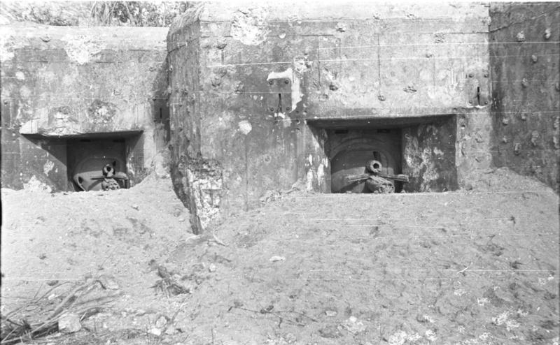 Vor einem Panzerwerk über dem Dnjestr bei Bronila unterhalb Mogilew, Juli 1941